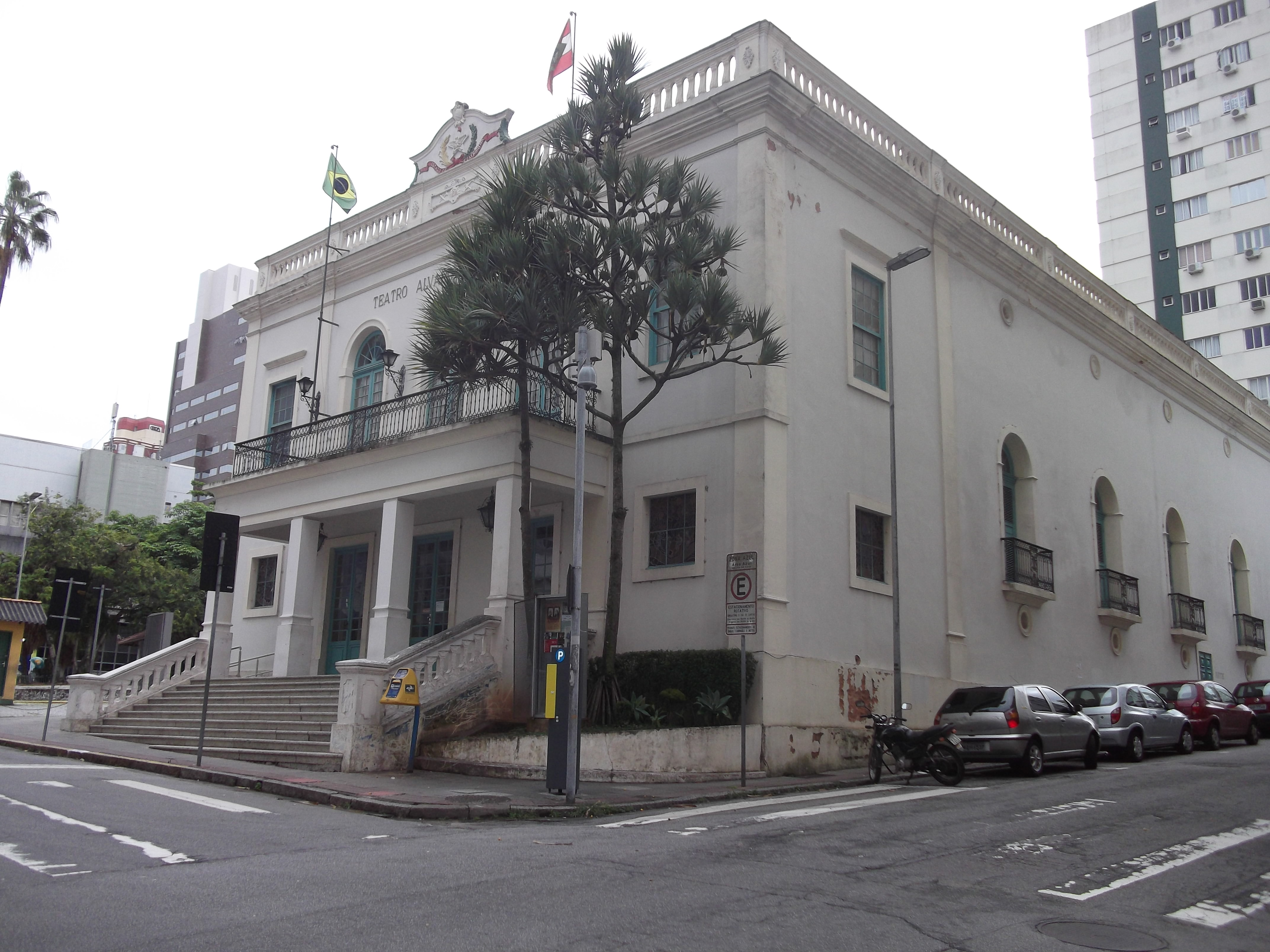 Teatro Álvaro de Carvalho, Florianópolis, Brasil